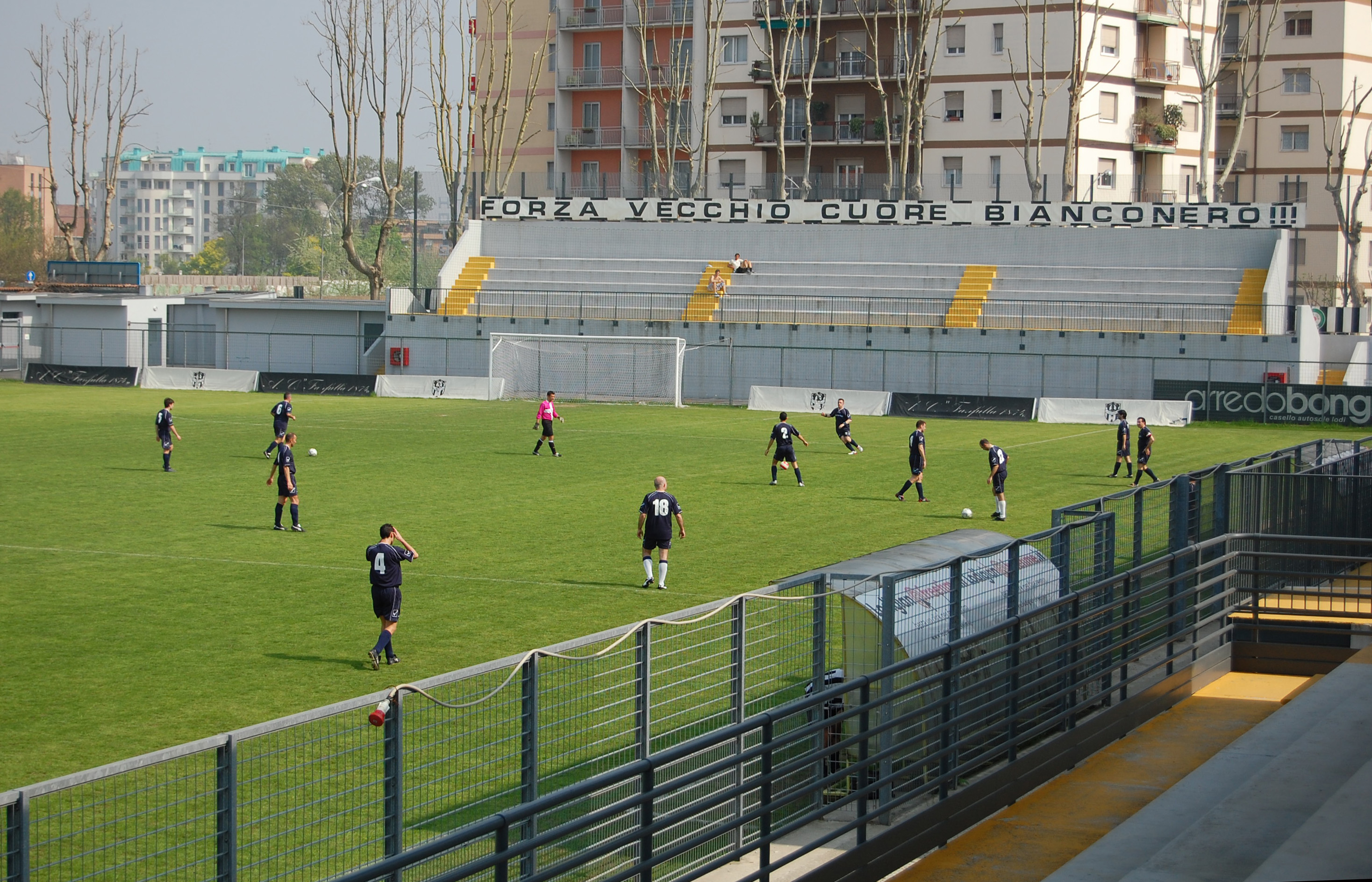 Stadio Dossenina di Lodi, curva dei tifosi di casa